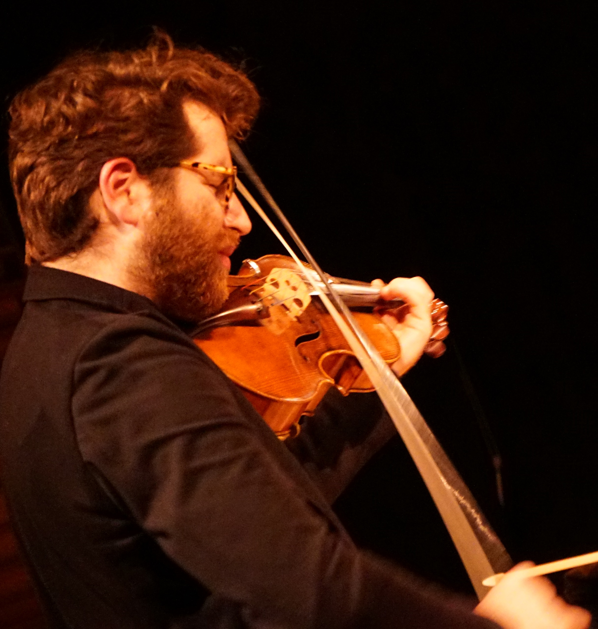 le projet velvet revolution à Césaré.